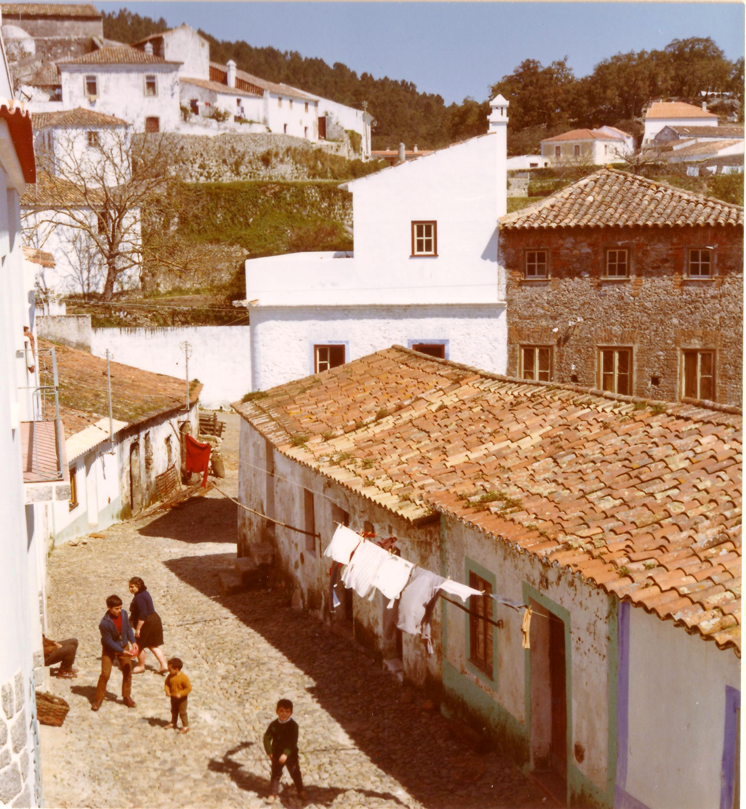 Monchique. Altstadt.